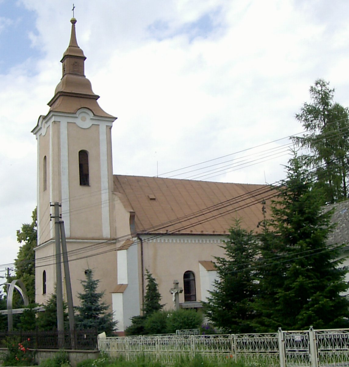 Sečovská Polianka, Rímskokatolícky kostol